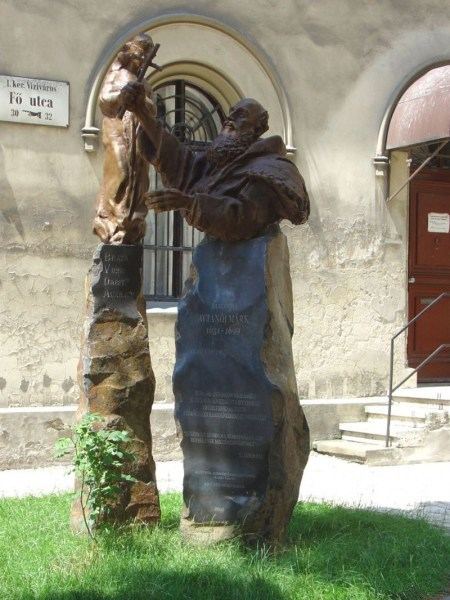 Avianói Márk szoborkompozíció, Budapest, 2006. Györfi Sándor szobrász alkotása.